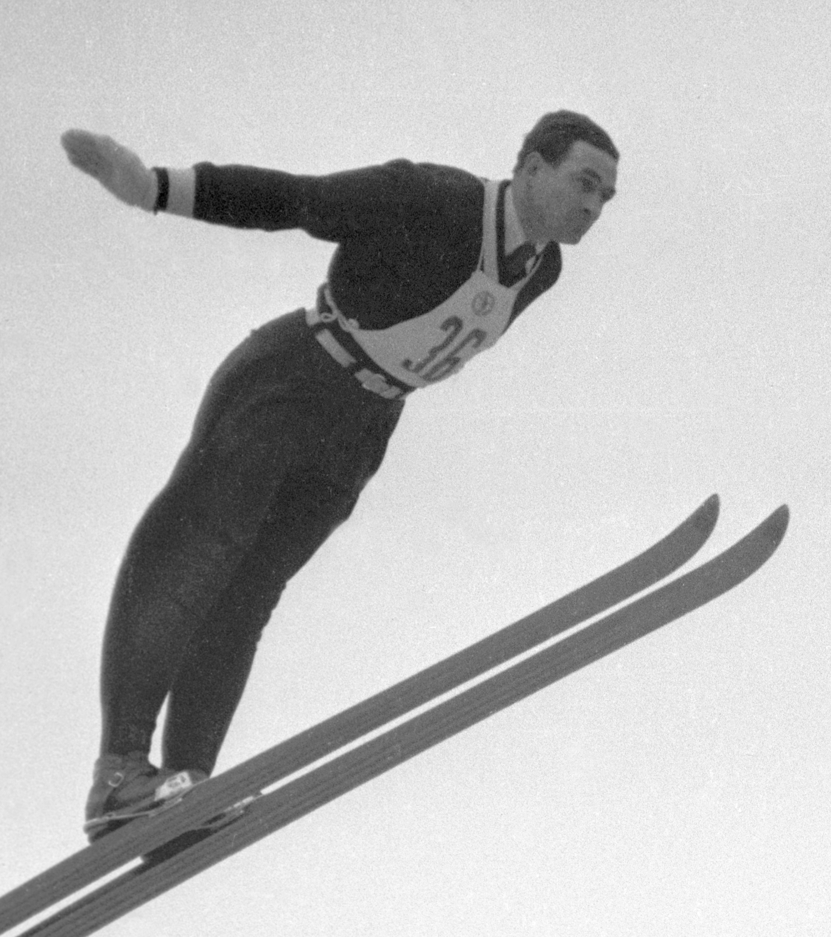 Simon Slåttvik à Holmenkollen en 1953